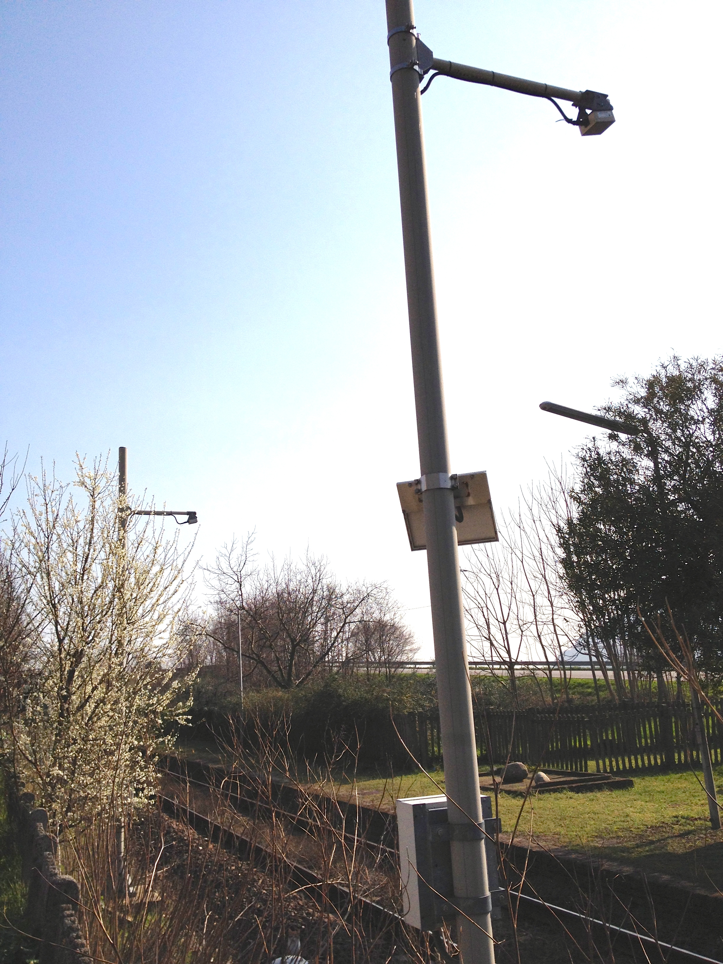 coppia di tag di appuntamento SSC ferrovie